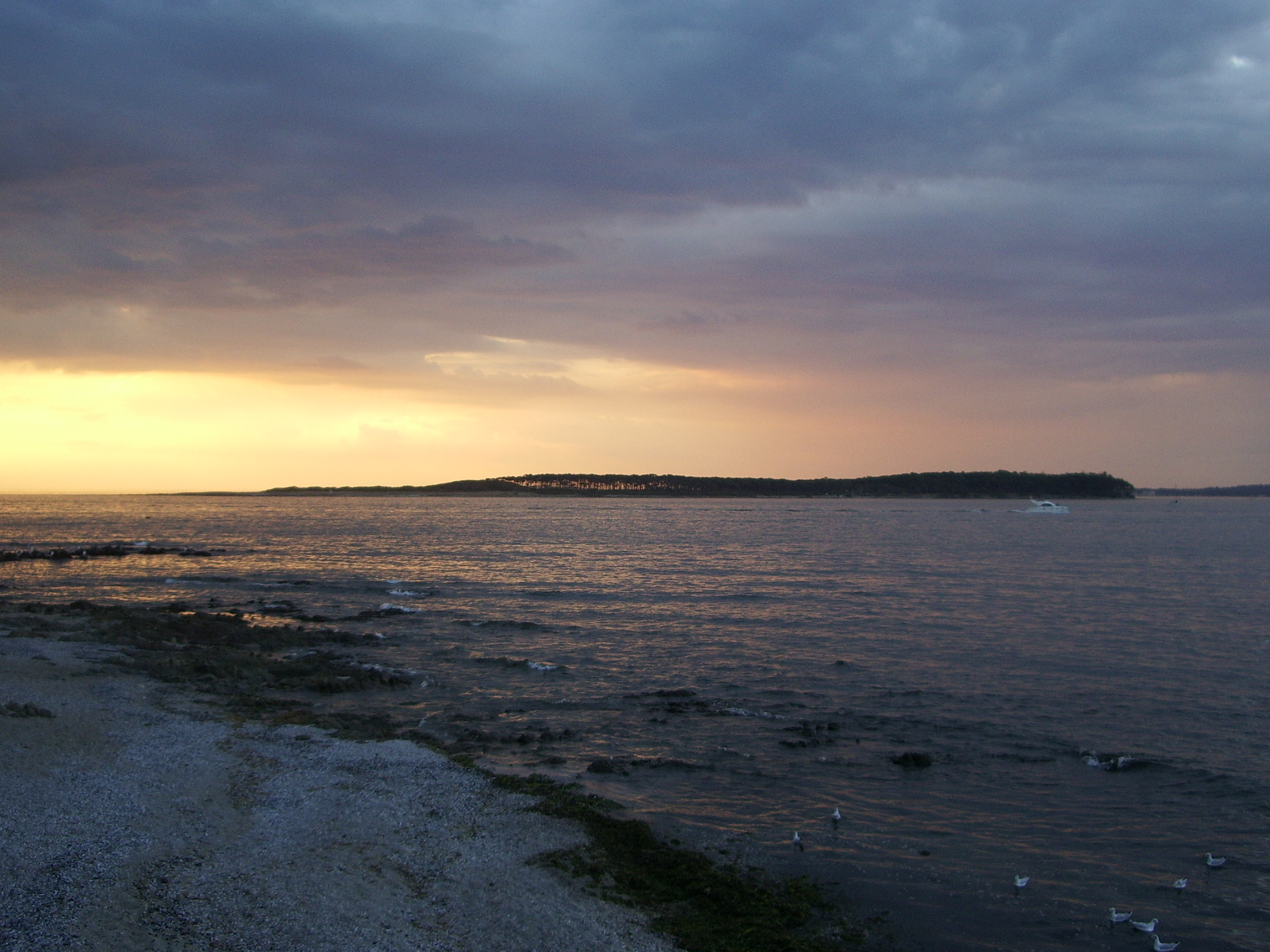 Isla Gorriti desde la península en un día un poco nublado y con tormenta al atardecer.